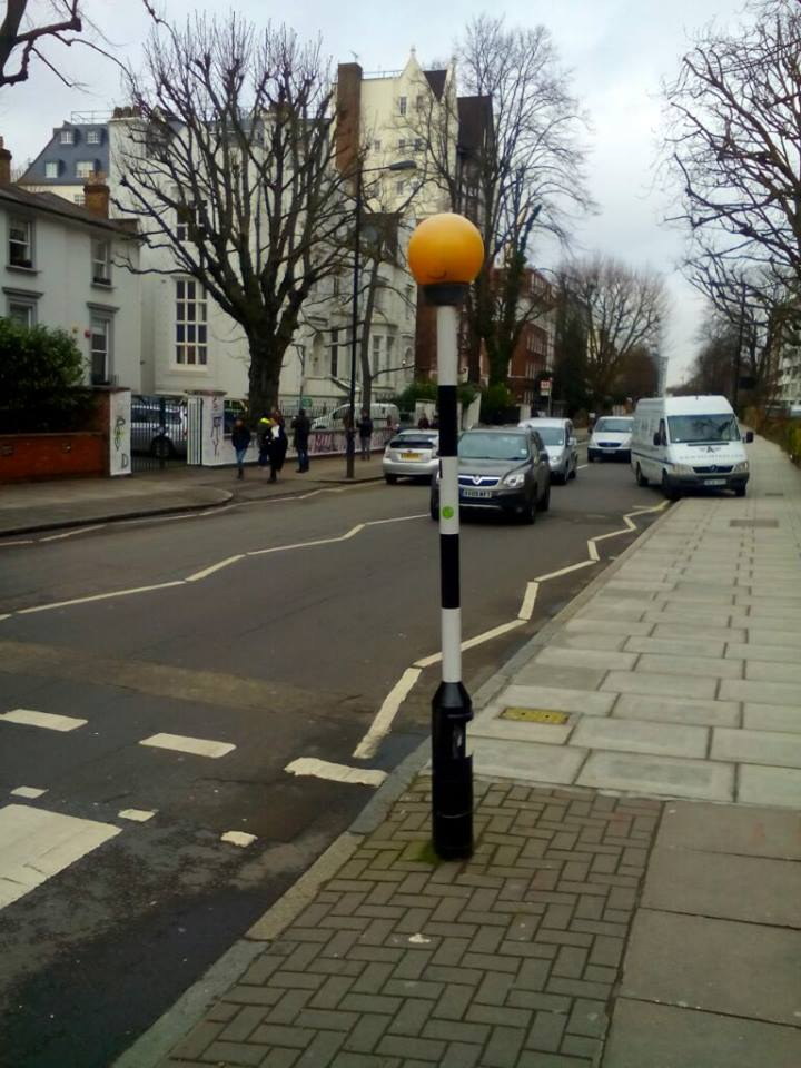 Abbey Road, ulica pored studija u kome su "Bitlsi" snimali albume, januar 2015.